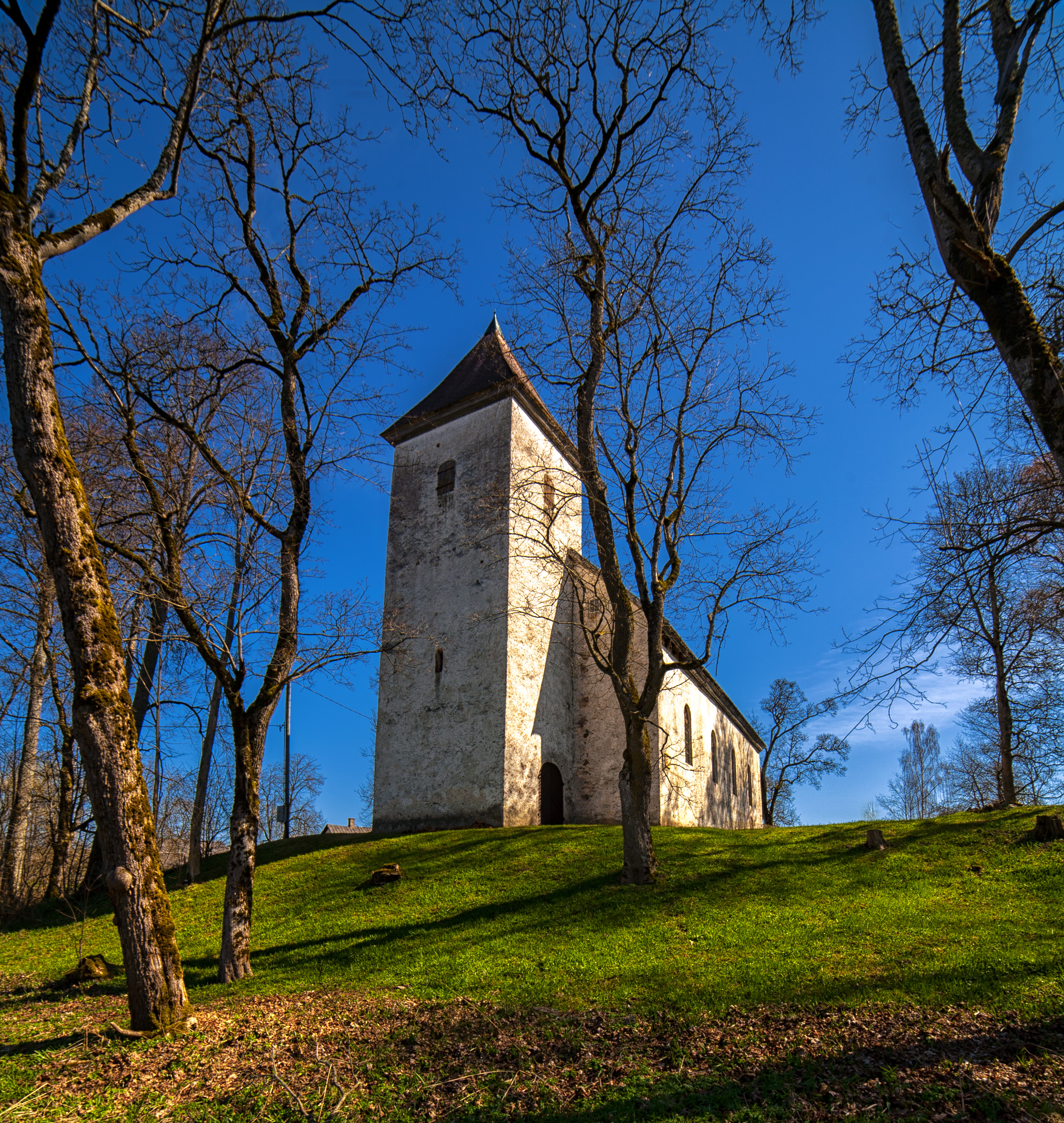 Cīravas luterāņu baznīca, Cīrava